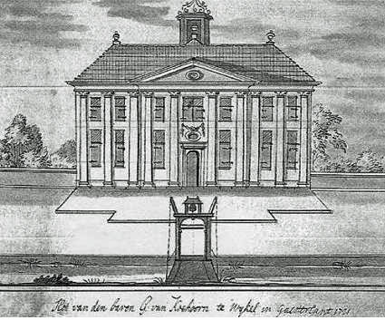 Het door Menno van Coehoorn gebouwde buitenhuis Meerenstein in het Friese Wickel